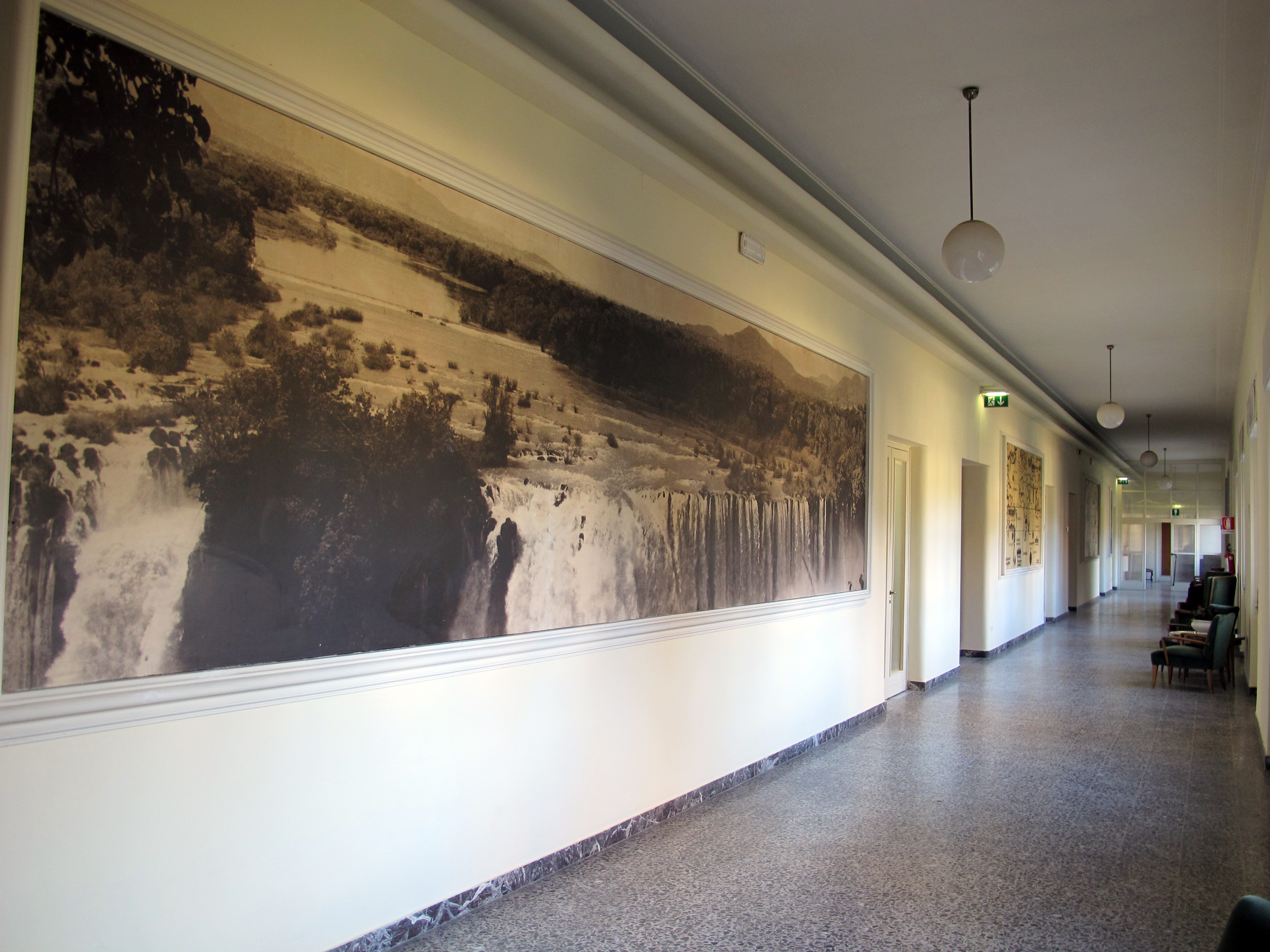 Istituto agronomico per l'oltremare, int.